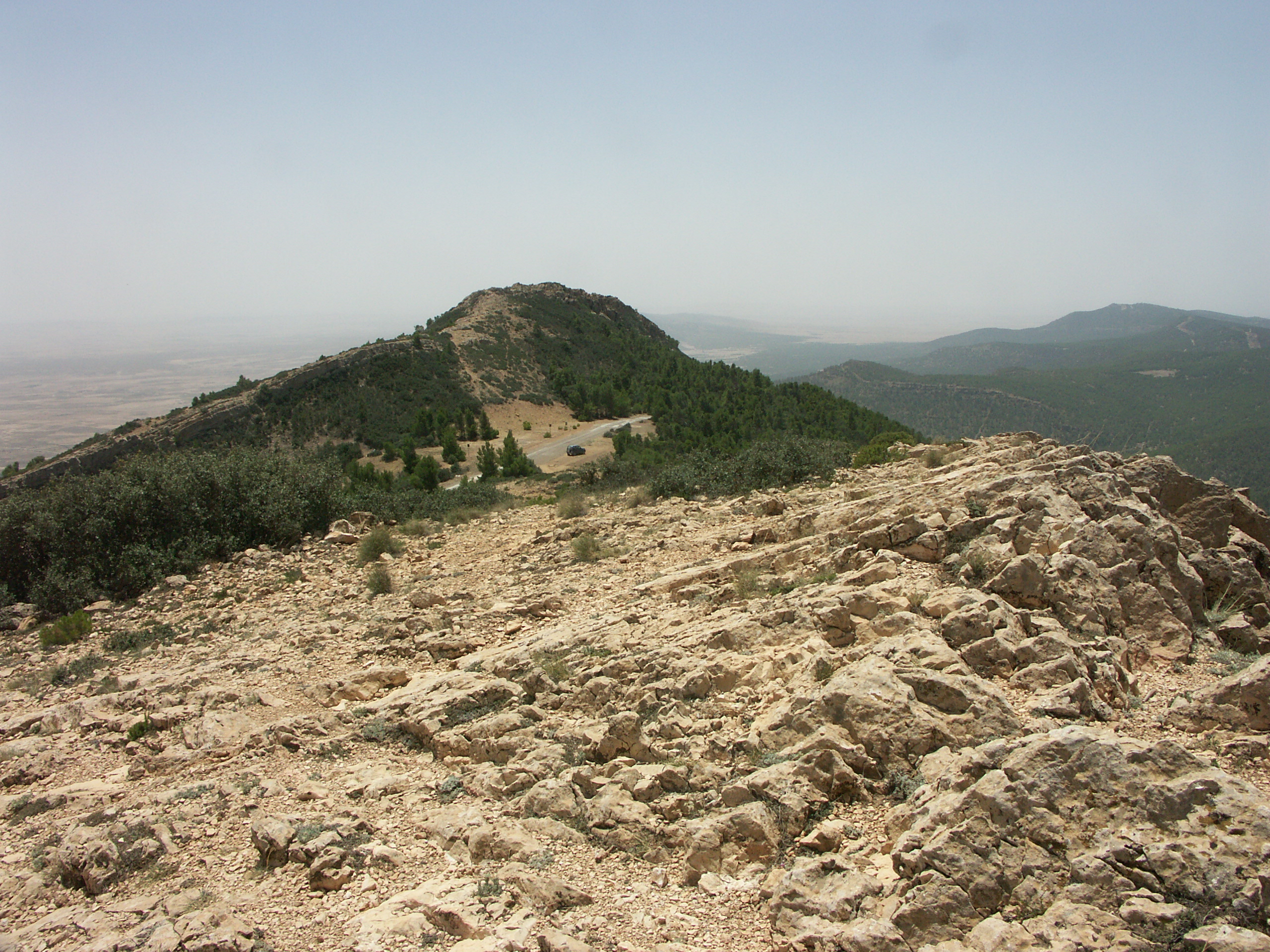 Vue depuis le sommet du Djebel Chambi (Kasserine, Tunisie)